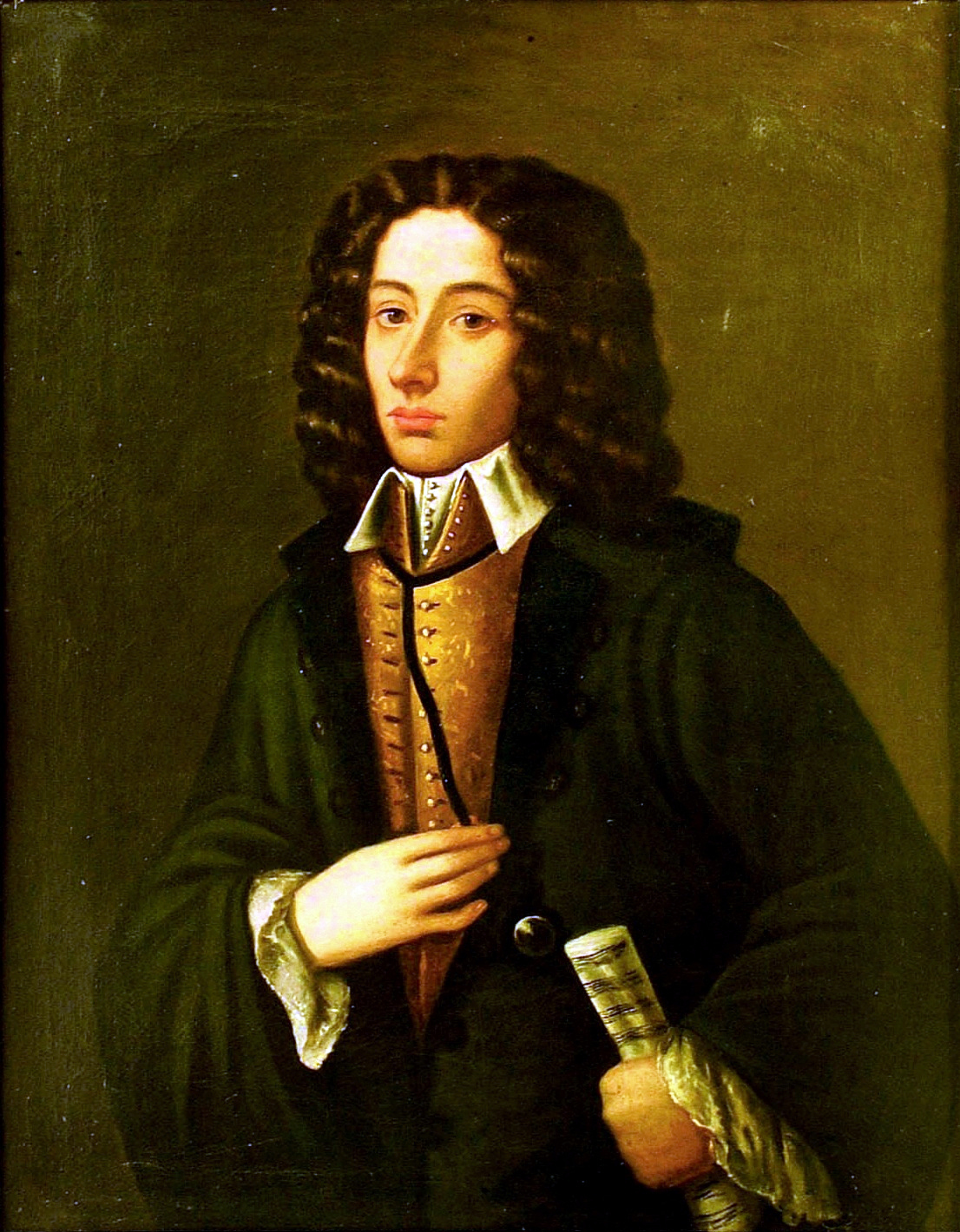 Depicted person: Giovanni Battista Pergolesi (1710-1736)